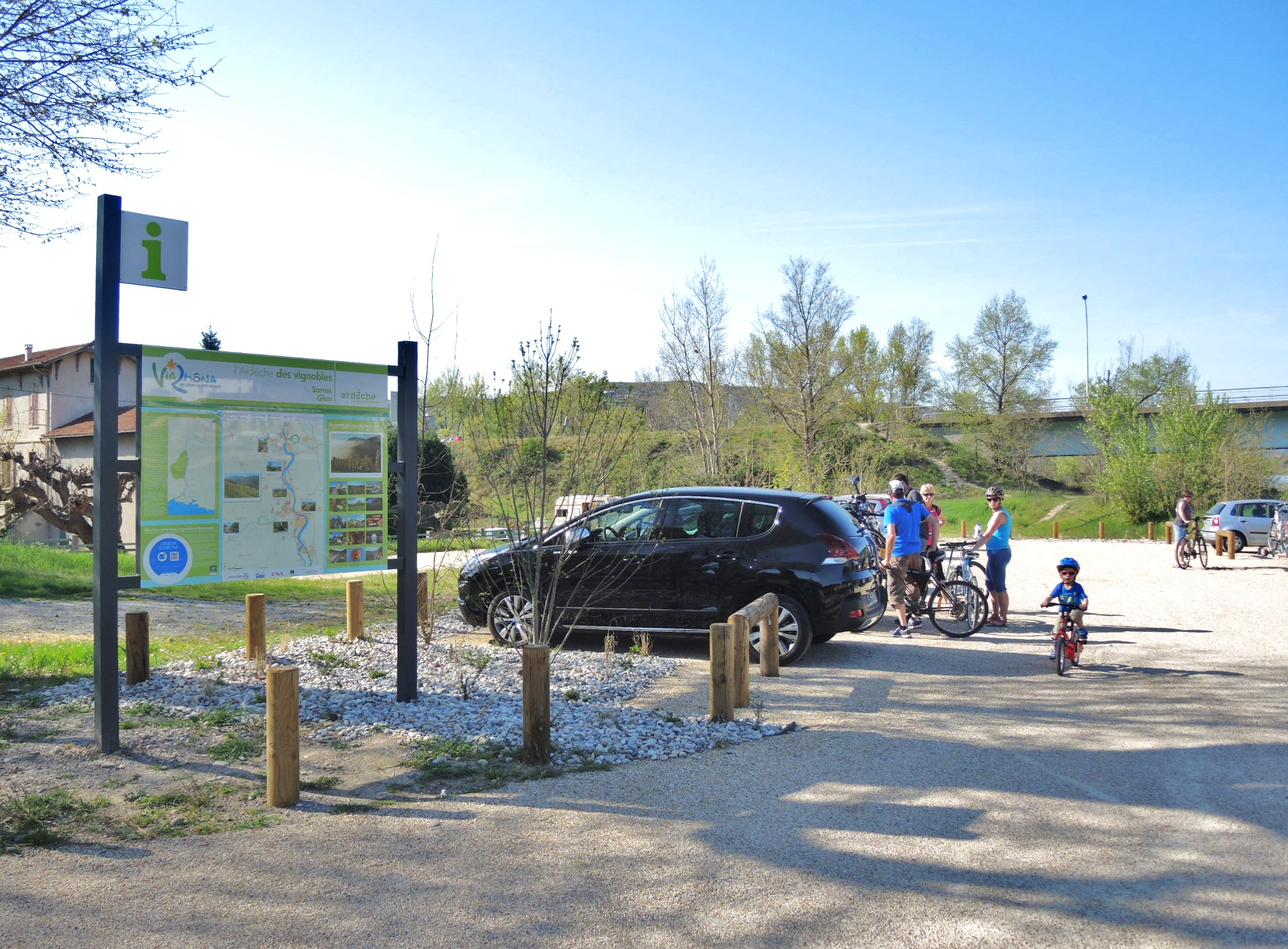 Sarras vue partielle